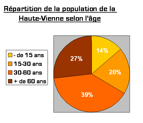 Répartition de la population du département de la Haute-Vienne selon l'âge